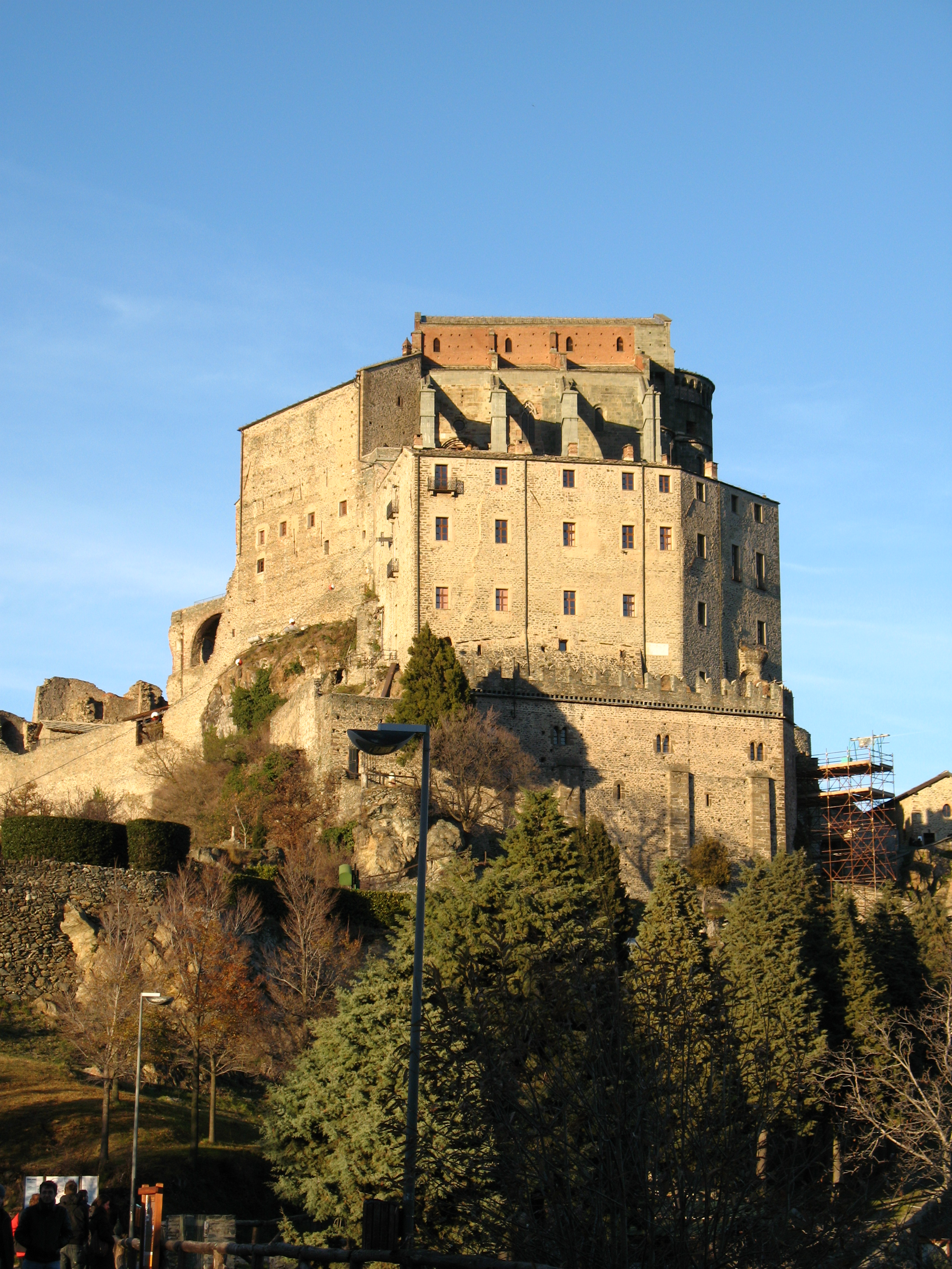 Sacra di San Michele - Valle di Susa